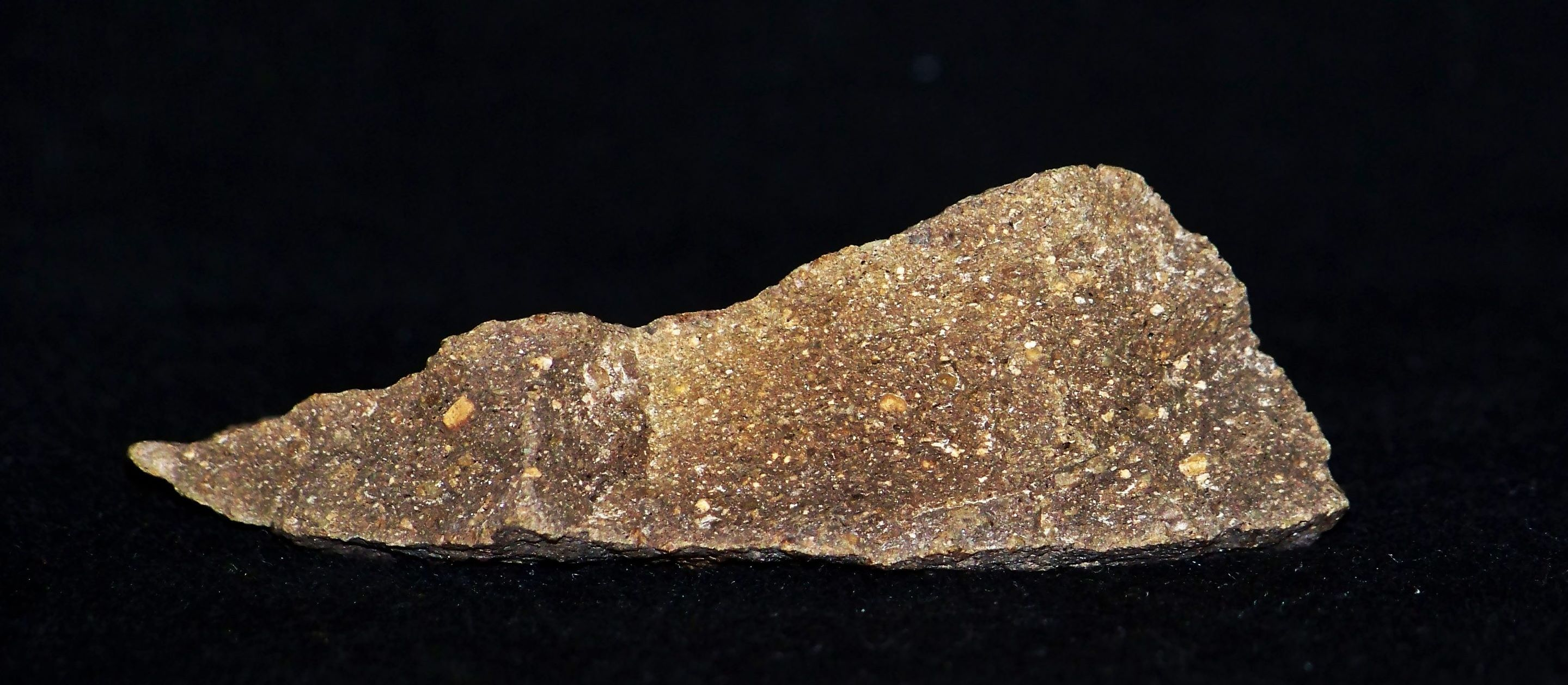 Szarogłaz, ludlow, Brdo nad rzeka Kierdonką, Góry Świetokrzyskie